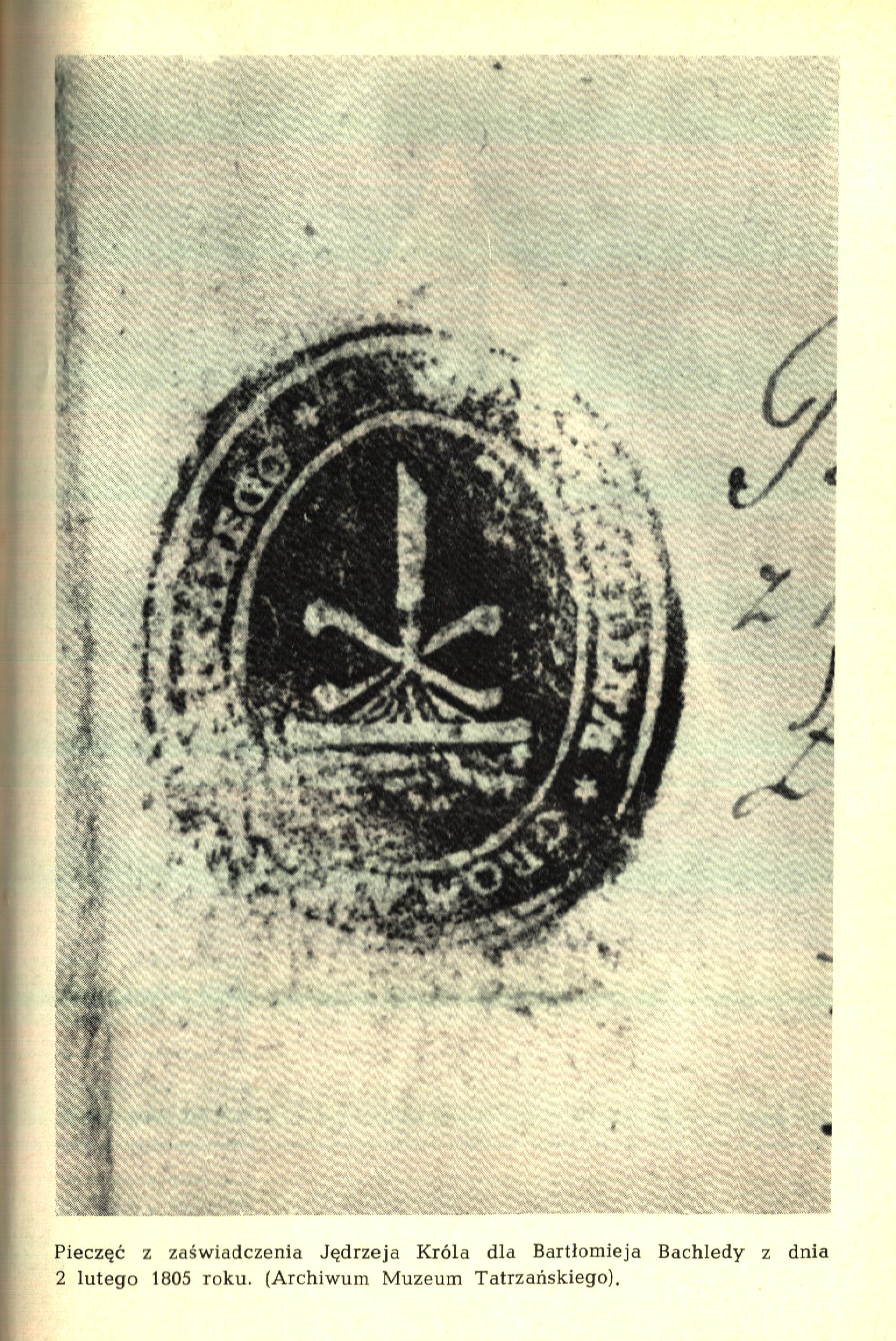 Pieczęćz zaświadczenia wójta Zakopanego Jędrzeja Króla dla Bartłomieja Bachledy z dnia 2 lutego 1805 (Archiwum Muzeum Tatrzańskiego)